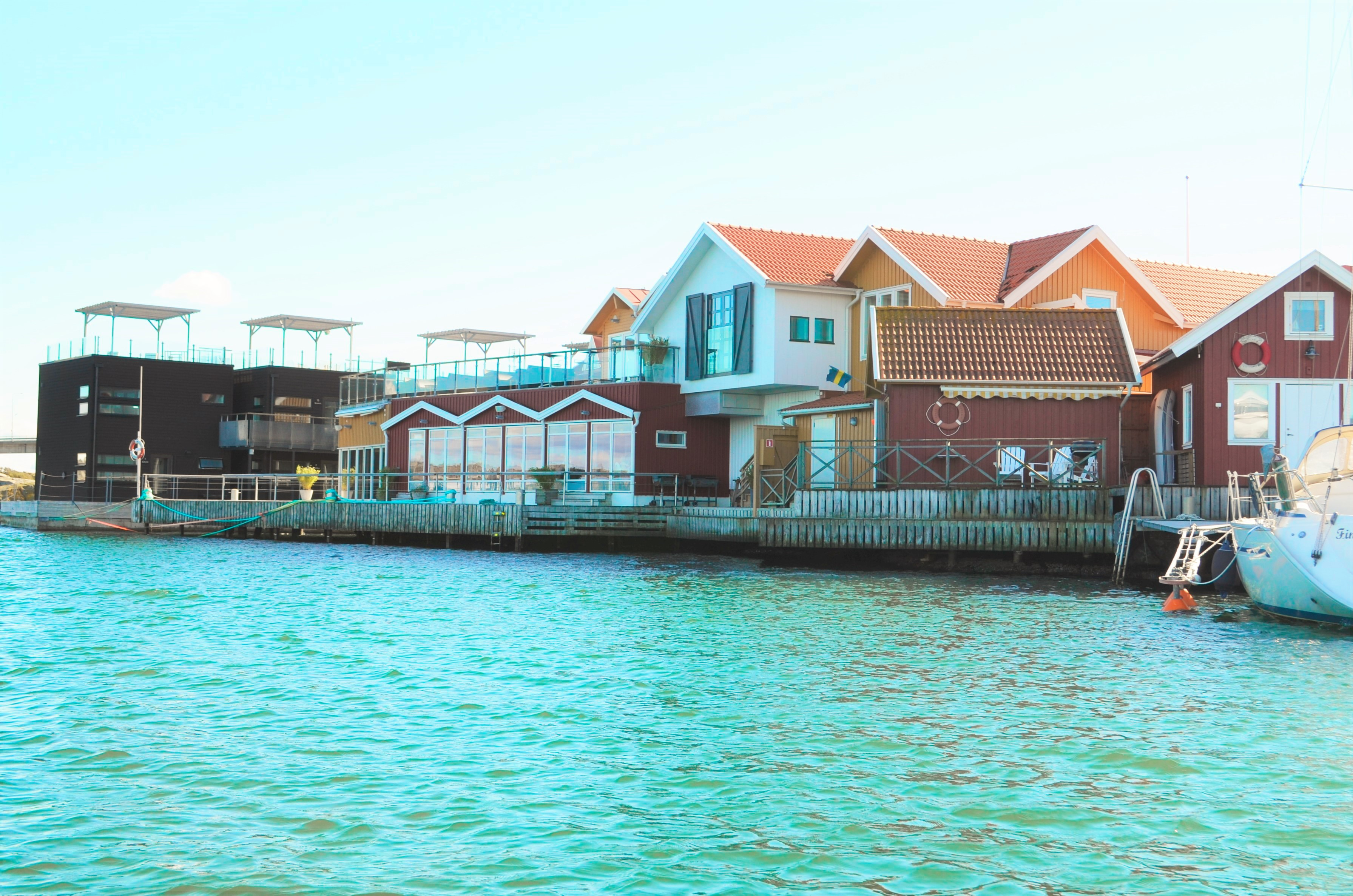 Salt & sill och flytande hotellet sett ifrån havet